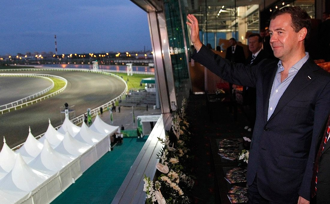 Во время посещения конно-спортивного комплекса «Казань».